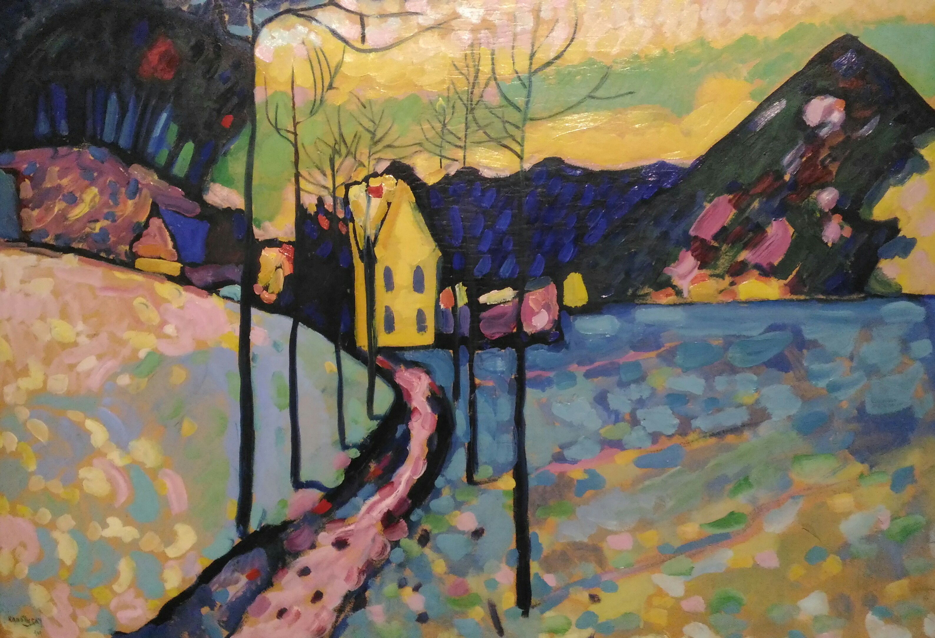 kandinsky